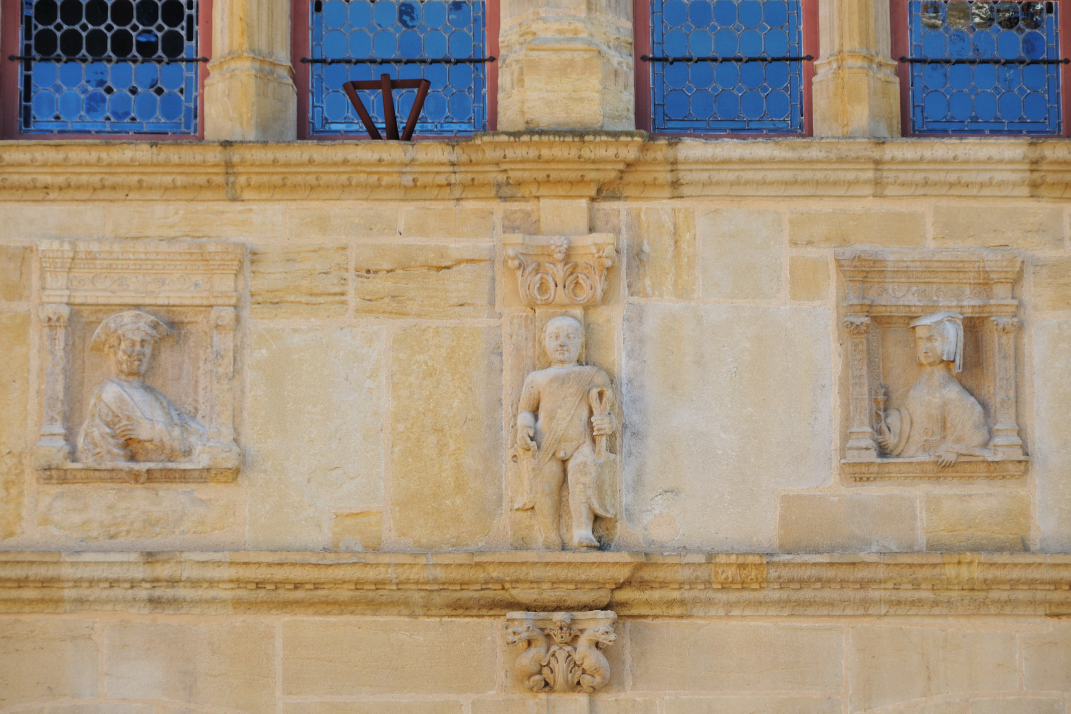 Hôtel de ville, ancienne maison Jayet (XVIe siècle), Paray-le-Monial, Saône-et-Loire, France Détail de la façade